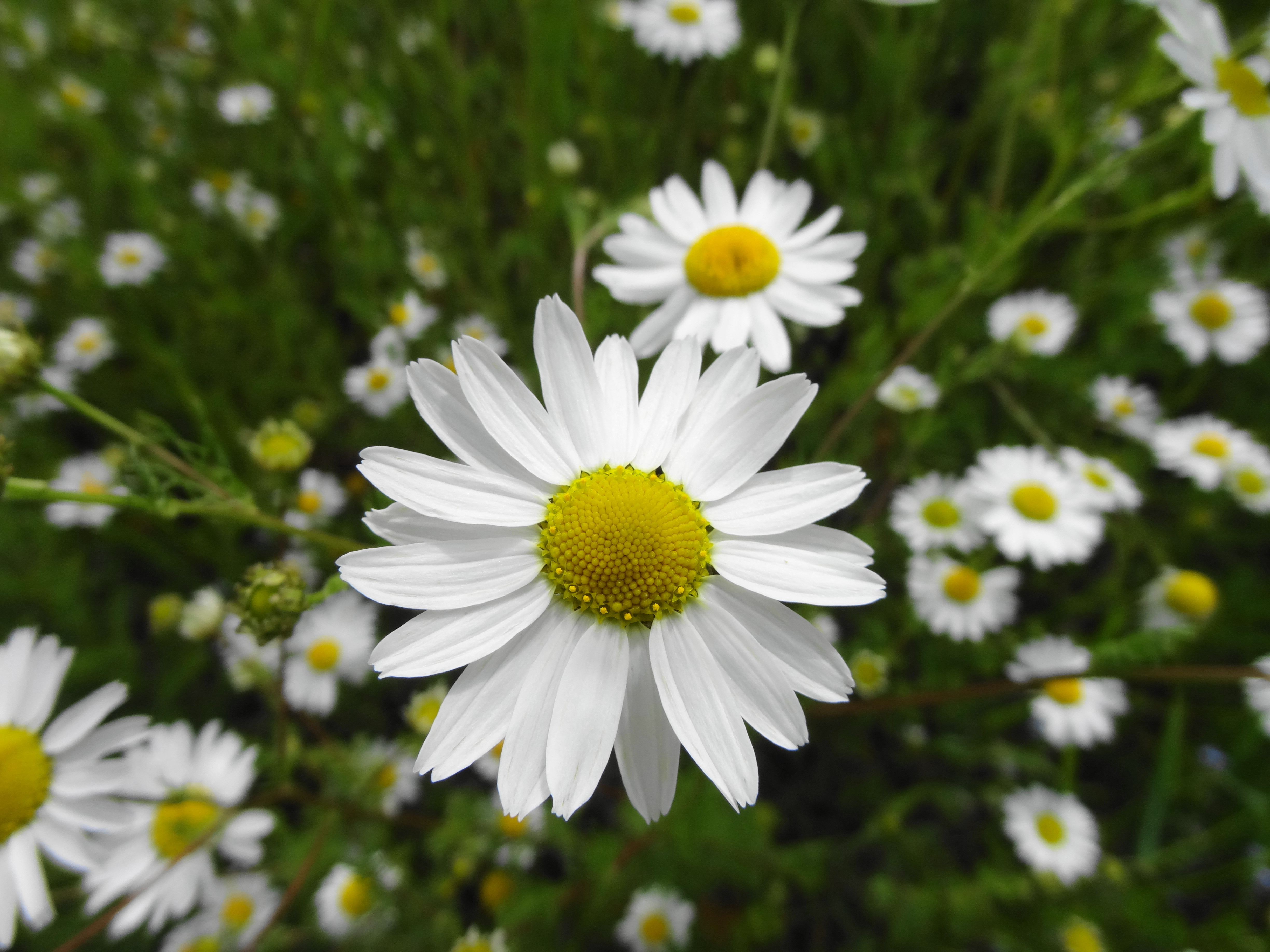 Acker-Hundskamille, Asteraceae, Deutschland, Bayern, Oberfranken, Selbitz Photo: U.Schmidt, 28.VI.2012